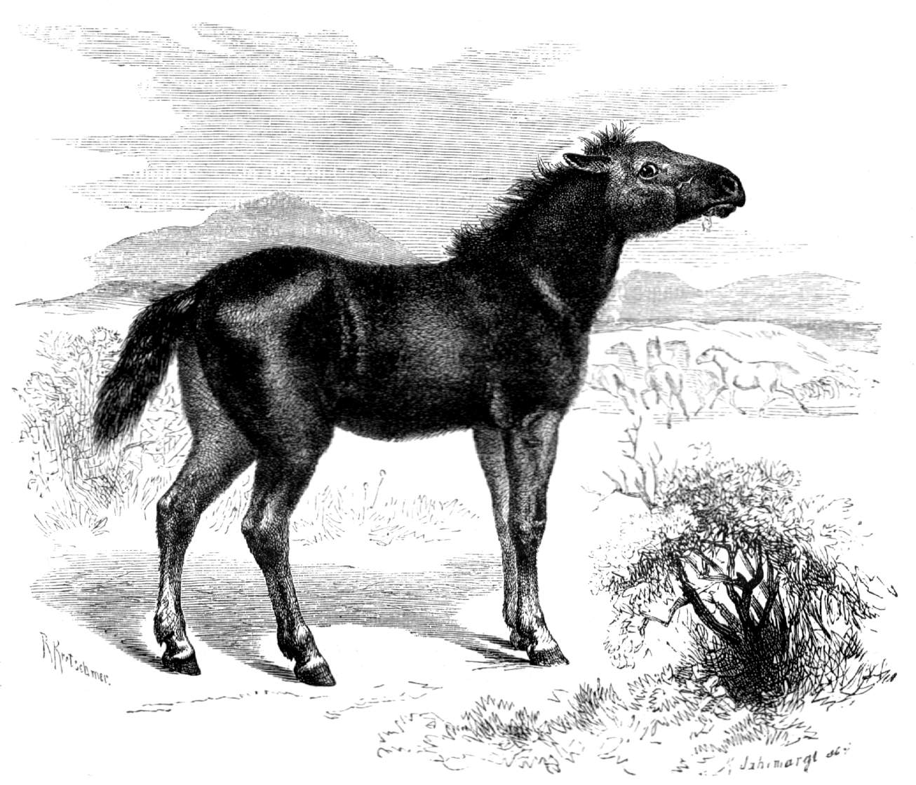 Steppentarpan (Equus ferus gmelini)